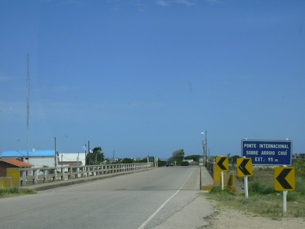 A ponte internacional sobre o arroio Chuí na fronteira entre o Brasil e o Uruguai.